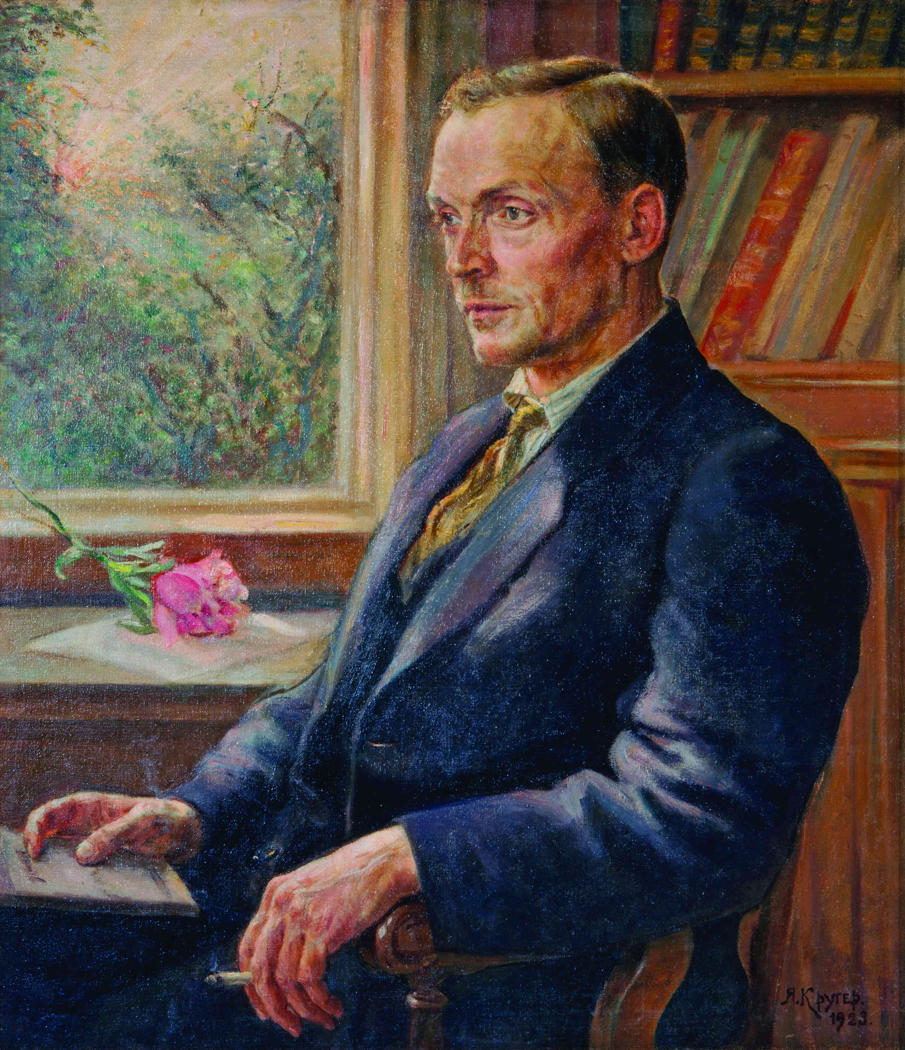 Партрэт Я. Купалы